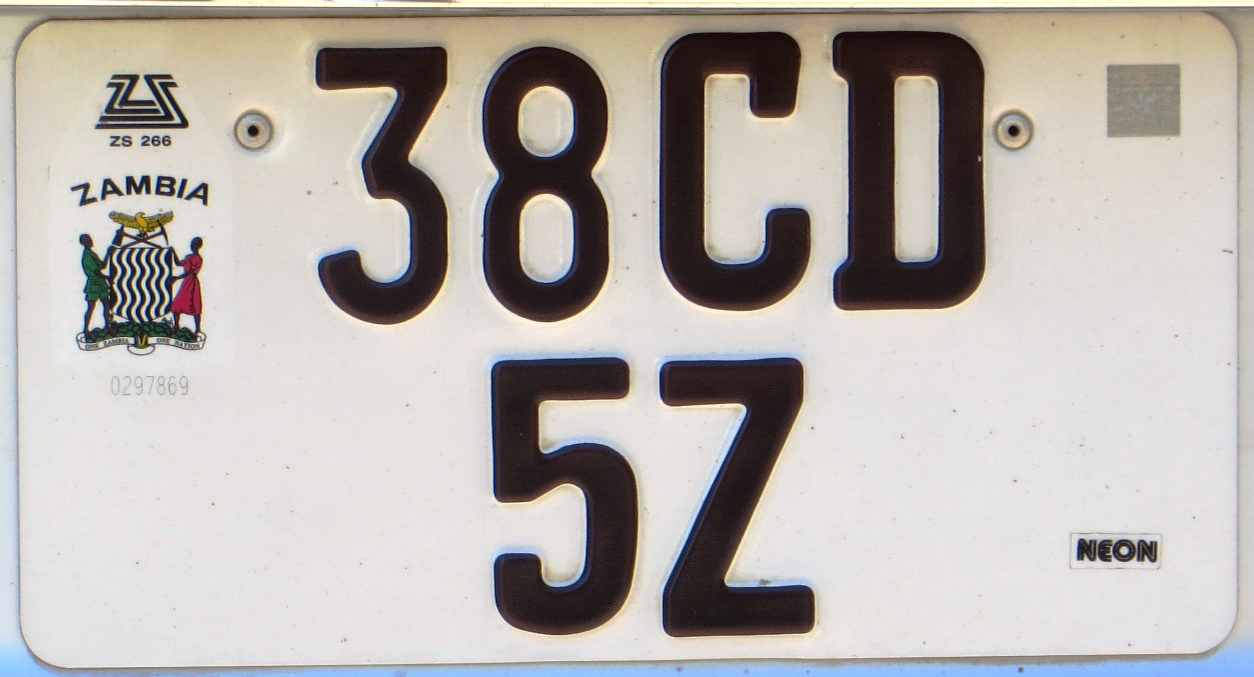 CD kentekenplaat Zambia